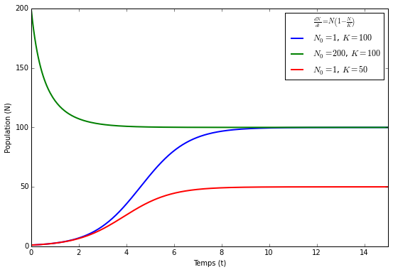 Quelques réalisation du modèle de croissance logistique (modèle de Verhulst) en dynamique des populations.